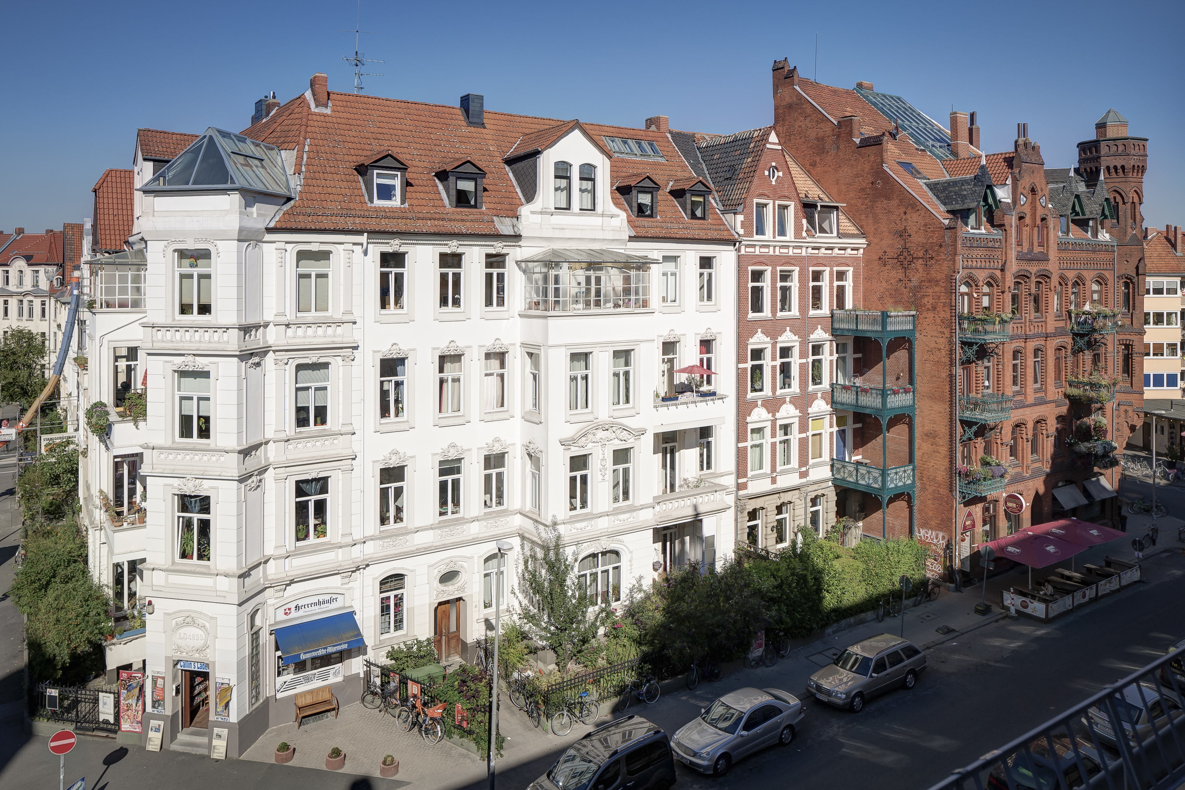 Mietshaus in der Callinstraße in Hannover.